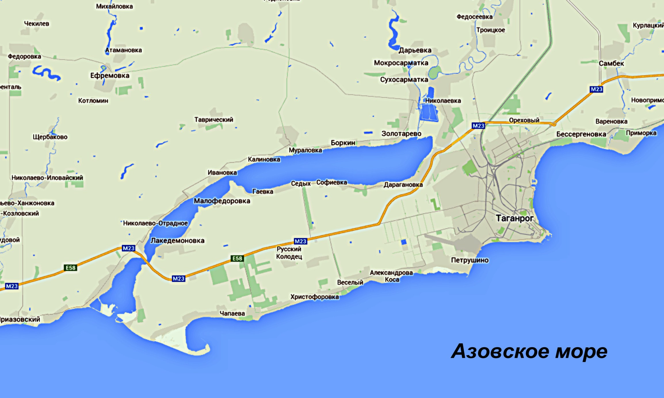 Миусский полуостров